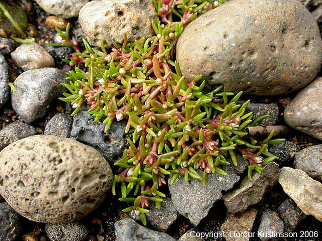 Tillaea (Crassula) aquatica an den heissen Quellen in Laugarás, Südisland.